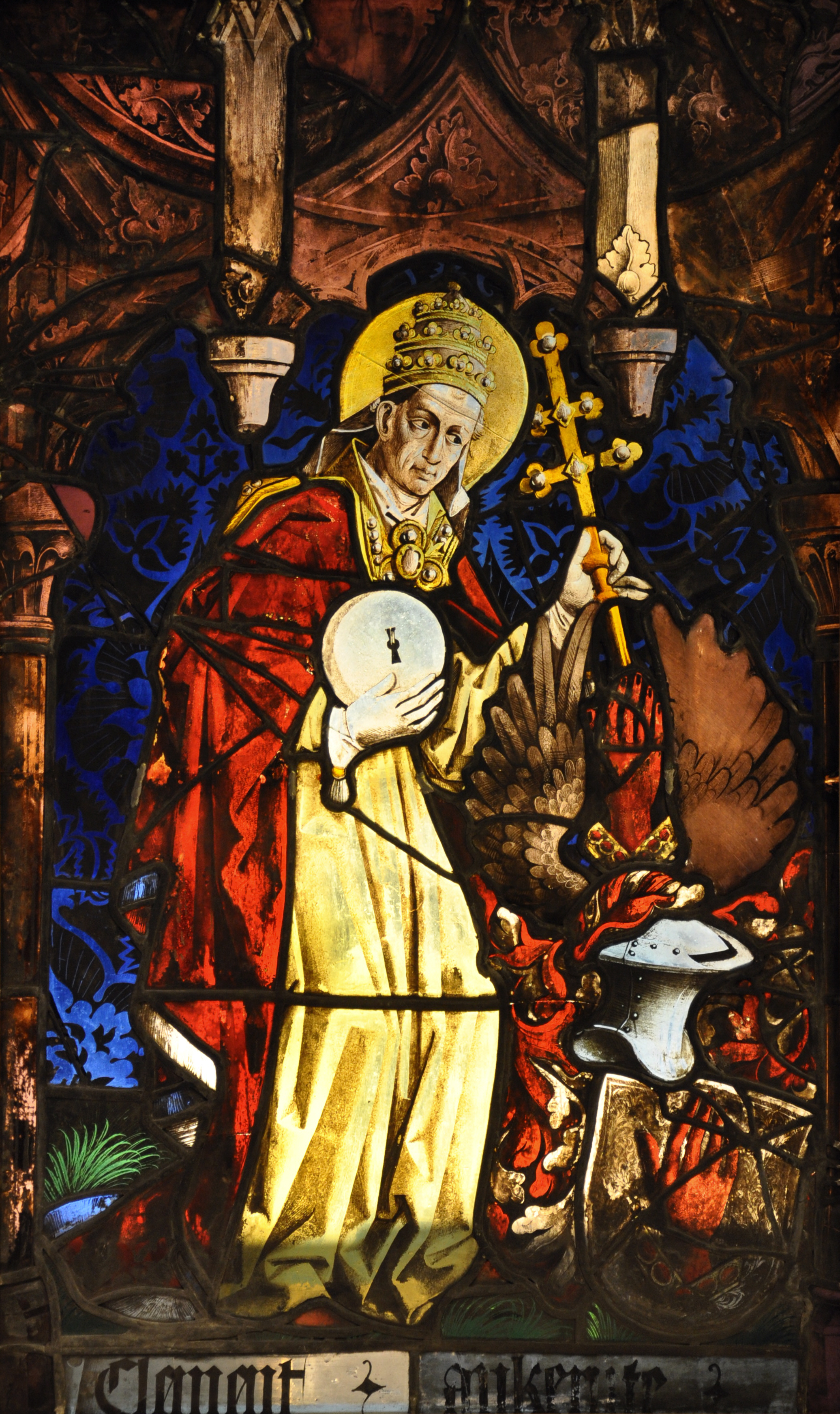 Liebfrauenkirche, Ravensburg: Südliches Glasfenster („Ankenreute-Fenster“) von Peter Hemmel von Andlau, 1477–1478, Hl. Papst Clemens (fotografiert in der Ausstellung "Jacob Russ" im Museum Humpis-Quartier Ravensburg; während der Renovierung der Liebfrauenkirche)